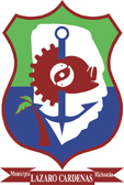 Escudo_Lazaro_Cardenas — Michoacán.